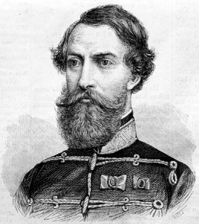 Driquet Péter (1820–1872) (cseh származású /francia eredetű családból/, magyar honos) honvéd alezredes, a 44. honvédzászlóalj parancsnoka, dandárparancsnok portréja. Rusz Károly metszete